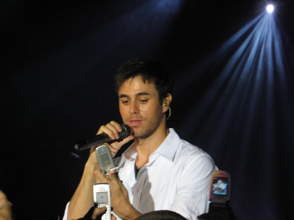 Enrique Iglesias